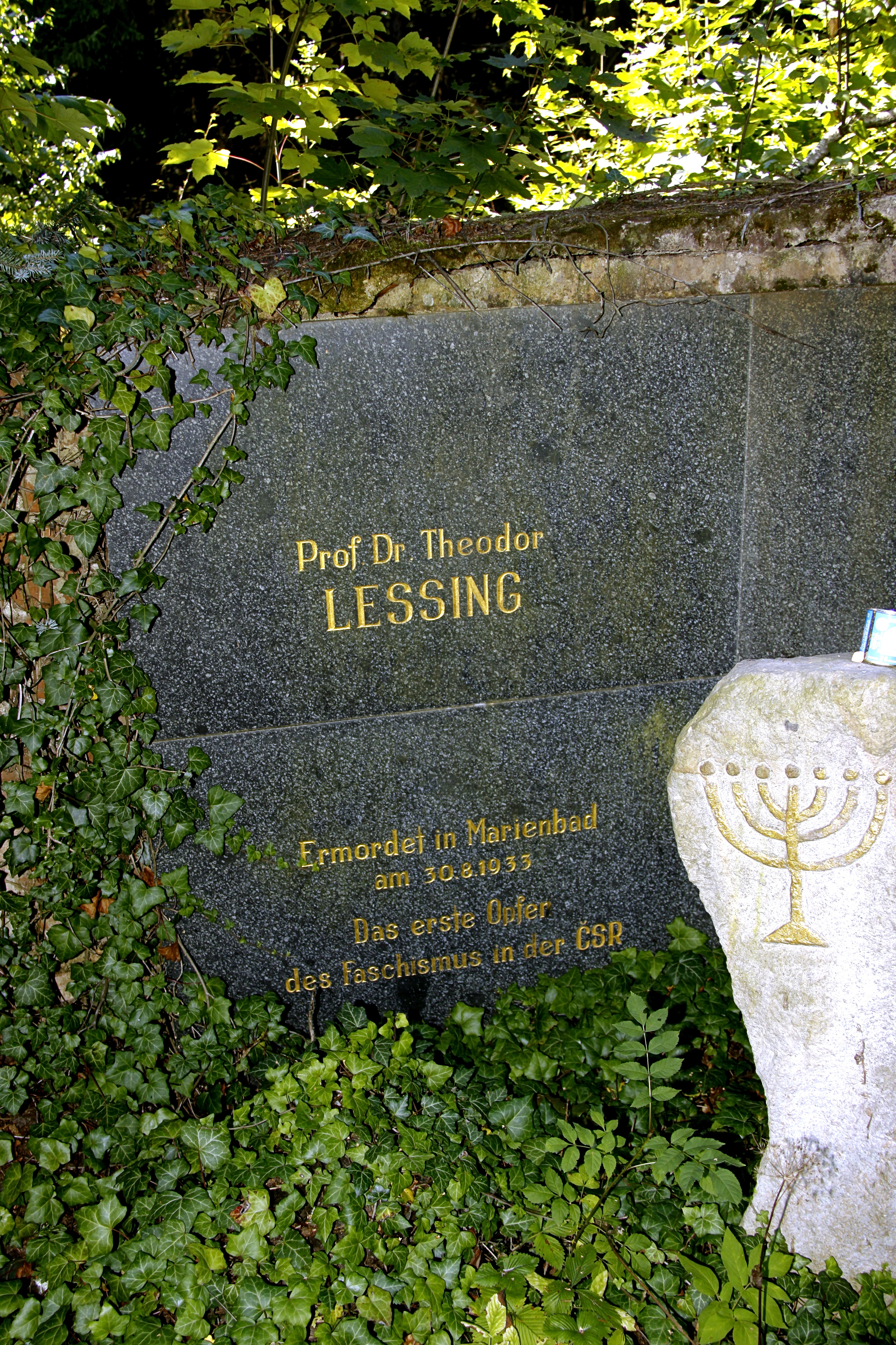 Grabmal von Prof. Dr. Theodor Lessing auf dem jüdischen Friedhof von Marienbad (Mariánské Lázně)